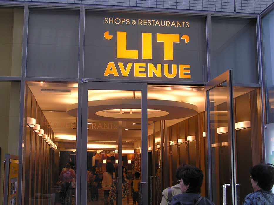 Lit Avenue entrance